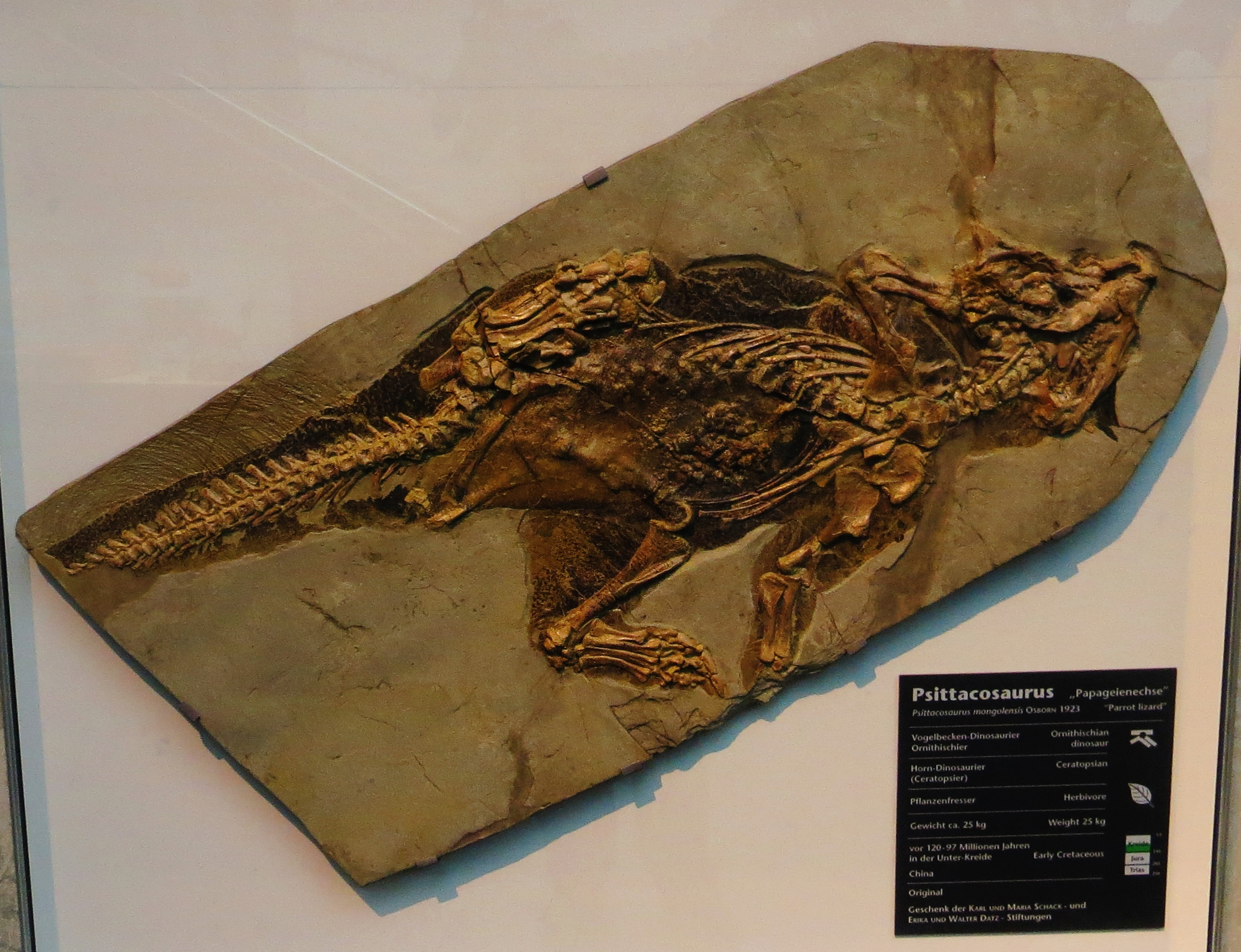 Fossil - Took the picture at Natural History Museum, Karlsruhe